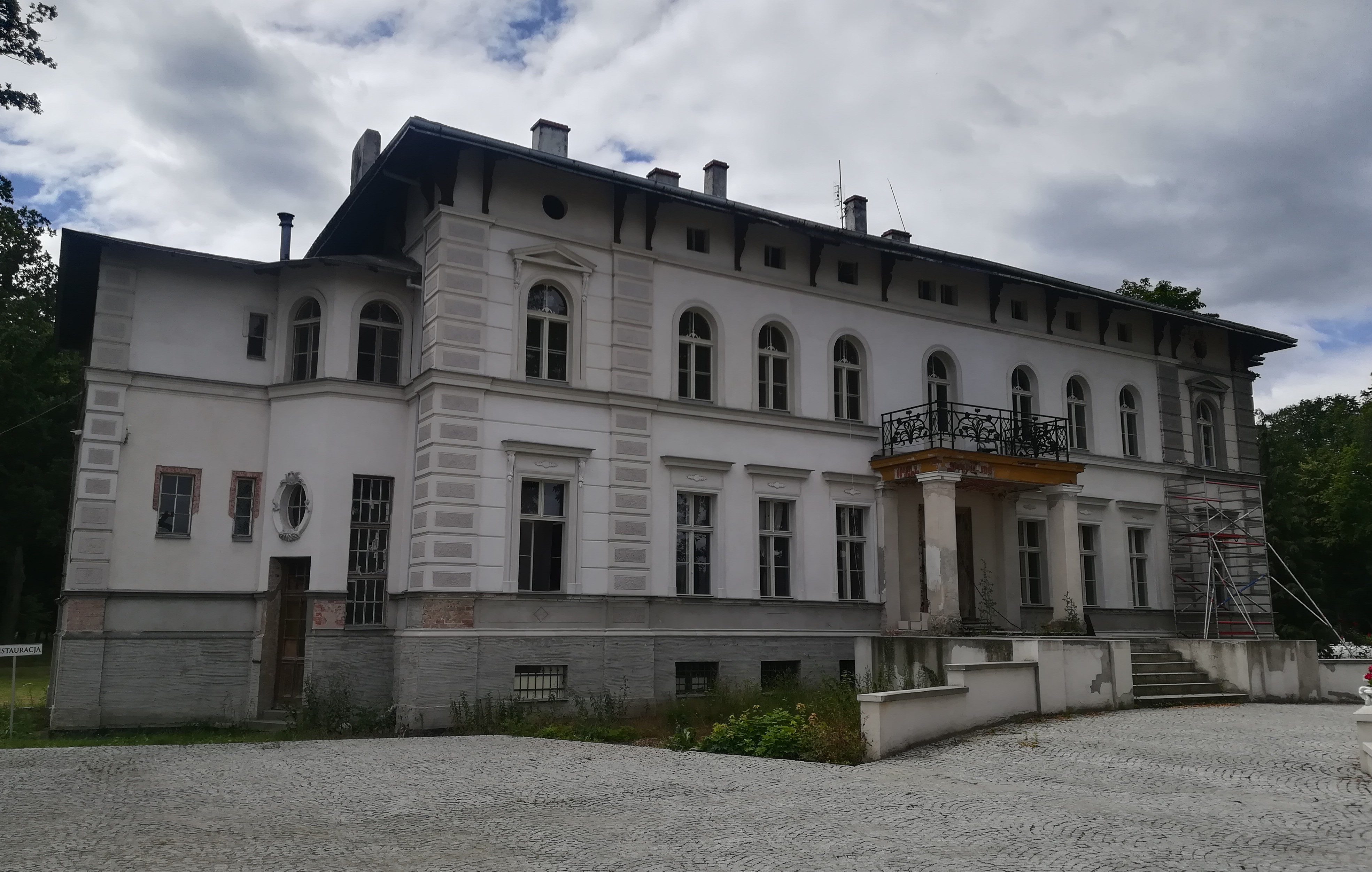 Dwór w Dąbrówce koło Rawicza.